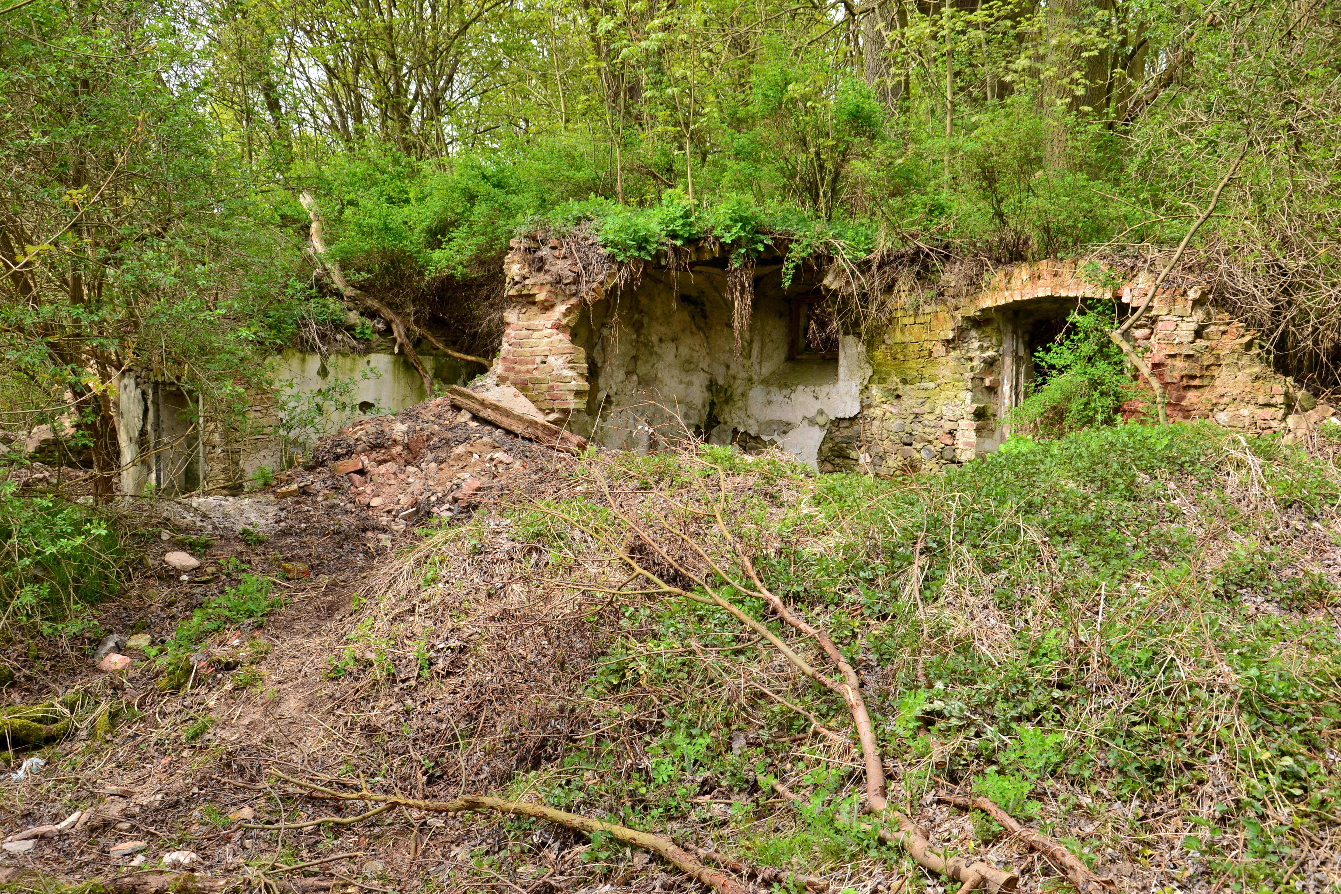 Fara, Vernéřov 12, Vernéřov (Klášterec nad Ohří).